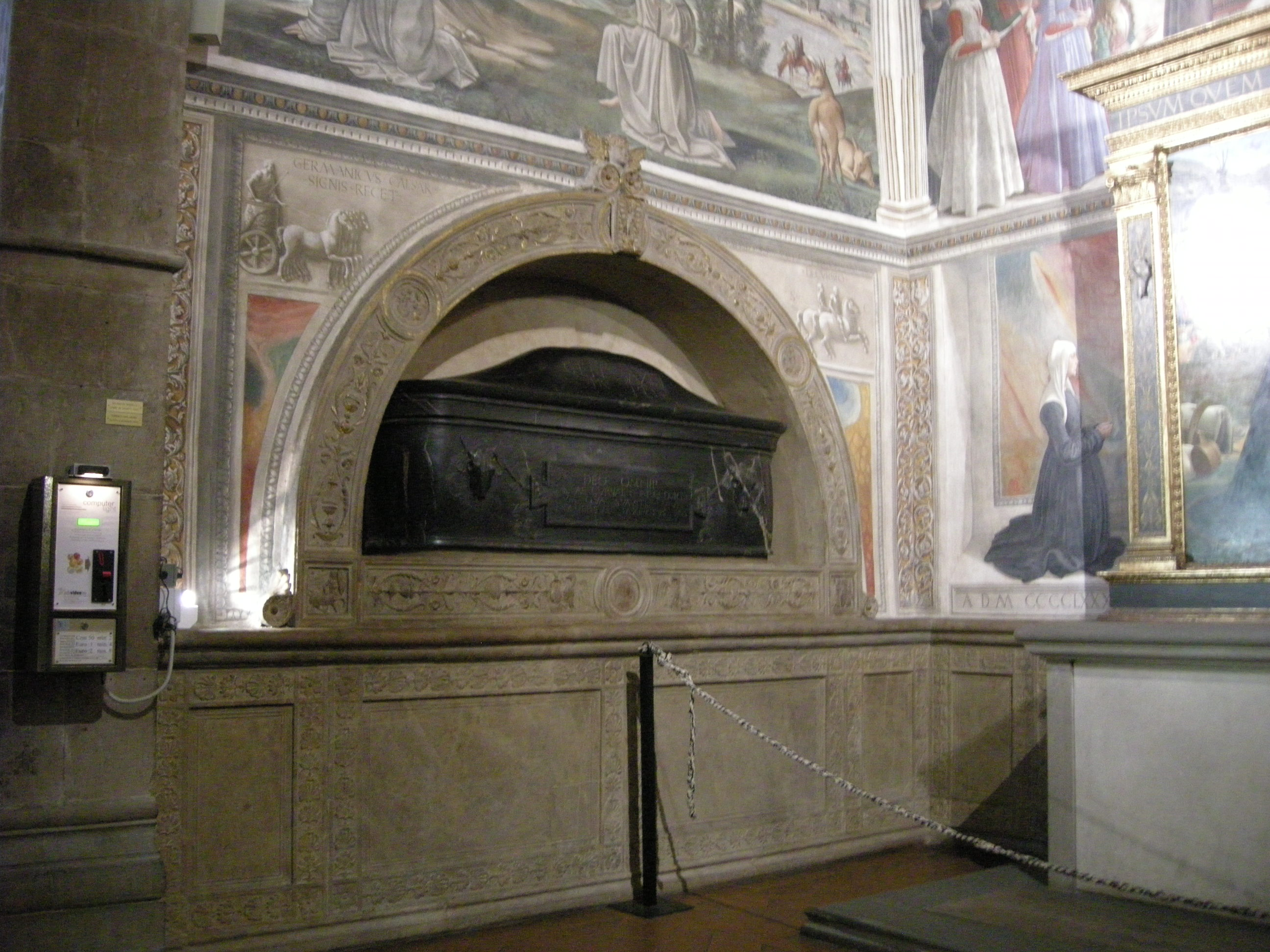 Santa trinita, cappella sassetti, giuliano da sangallo, sepolcro2